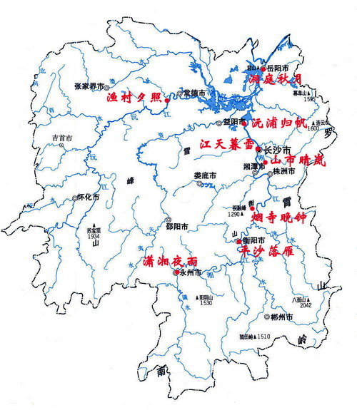 描述摘要: 潇湘八景位置图 /來源: 底图来自国家测绘局网站允许下载使用的地图，再通过photoshop加工而成